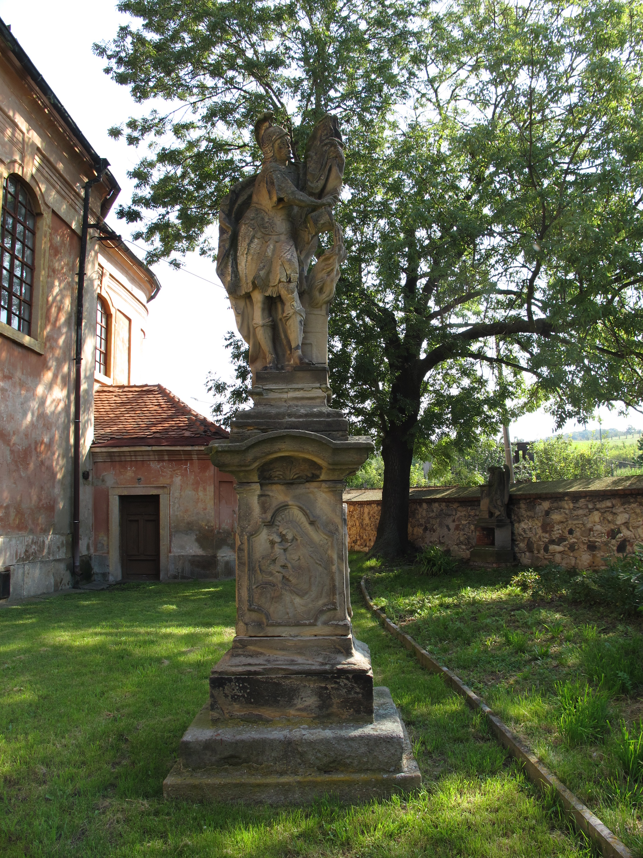 Socha sv. Floriána u kostela v Bečově, okres Most